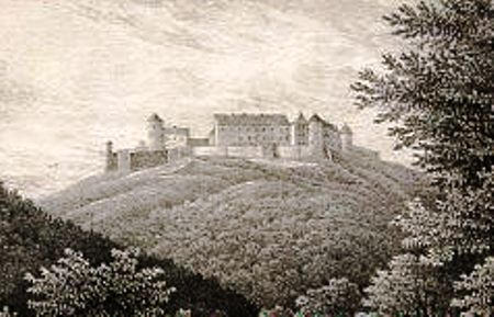 Burg Hohenzollern im Jahr 1815